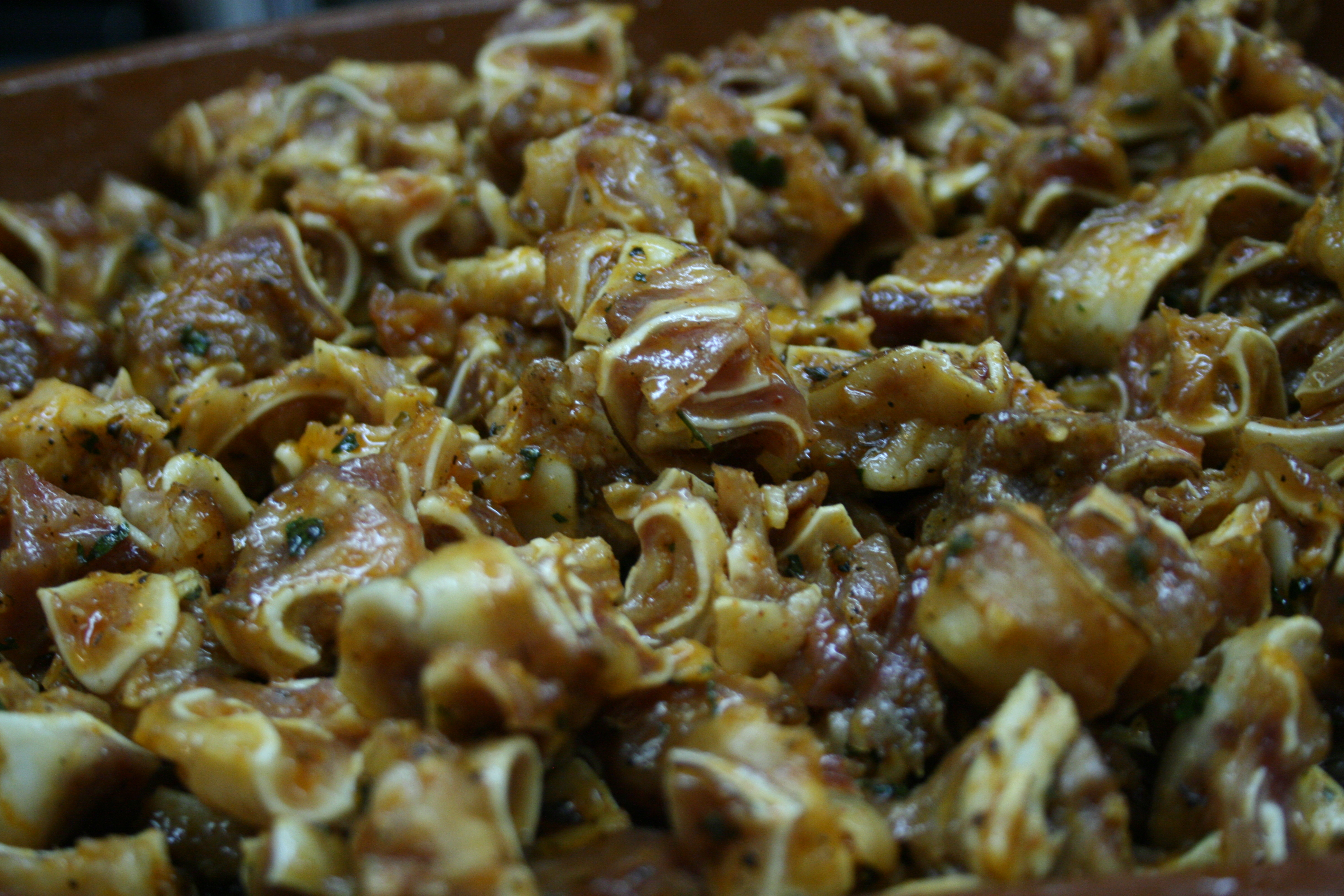 Orejas de cerdo (detalle) - "los caracoles"